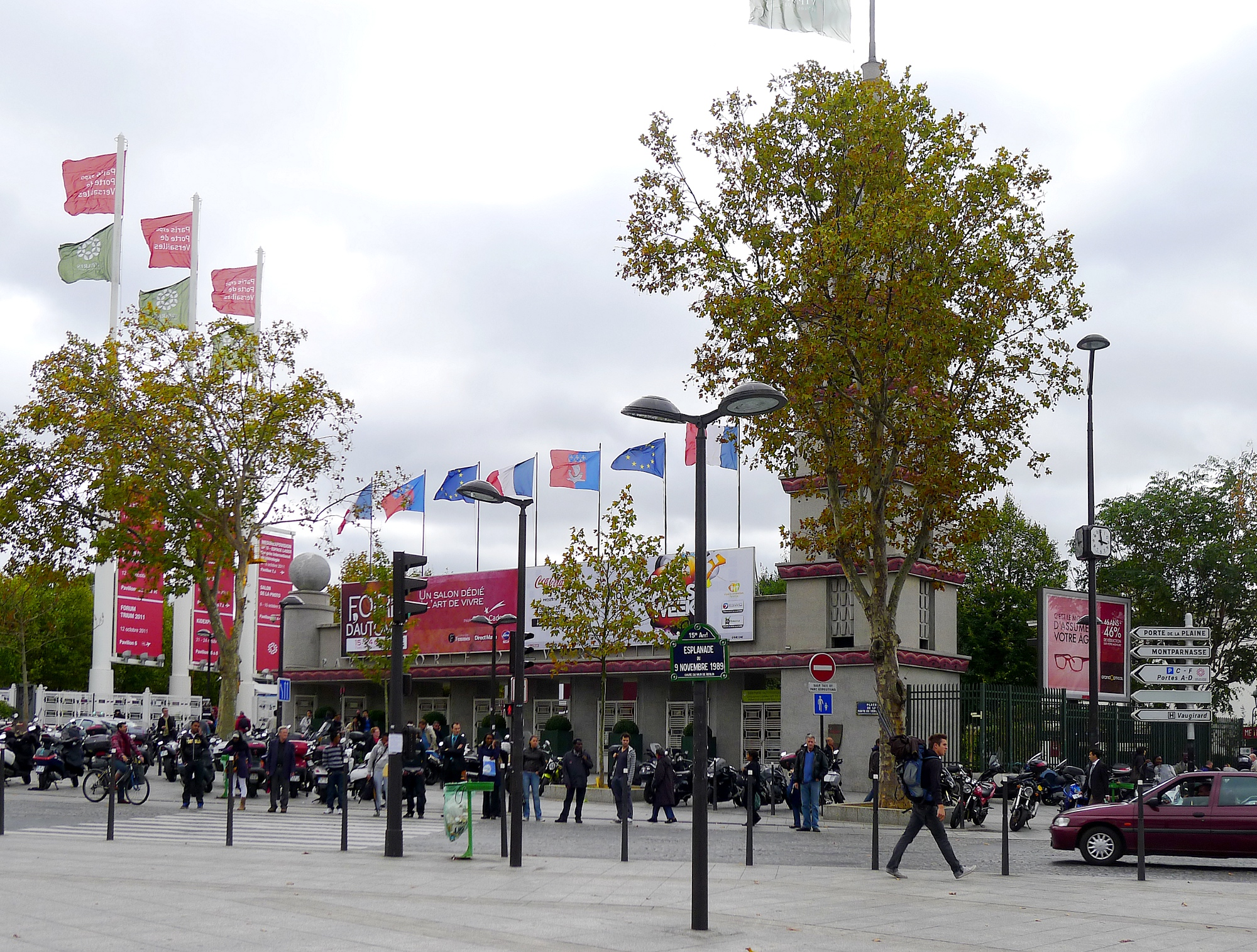 Porte de Versailles, entrée du parc des expositions - Paris XV